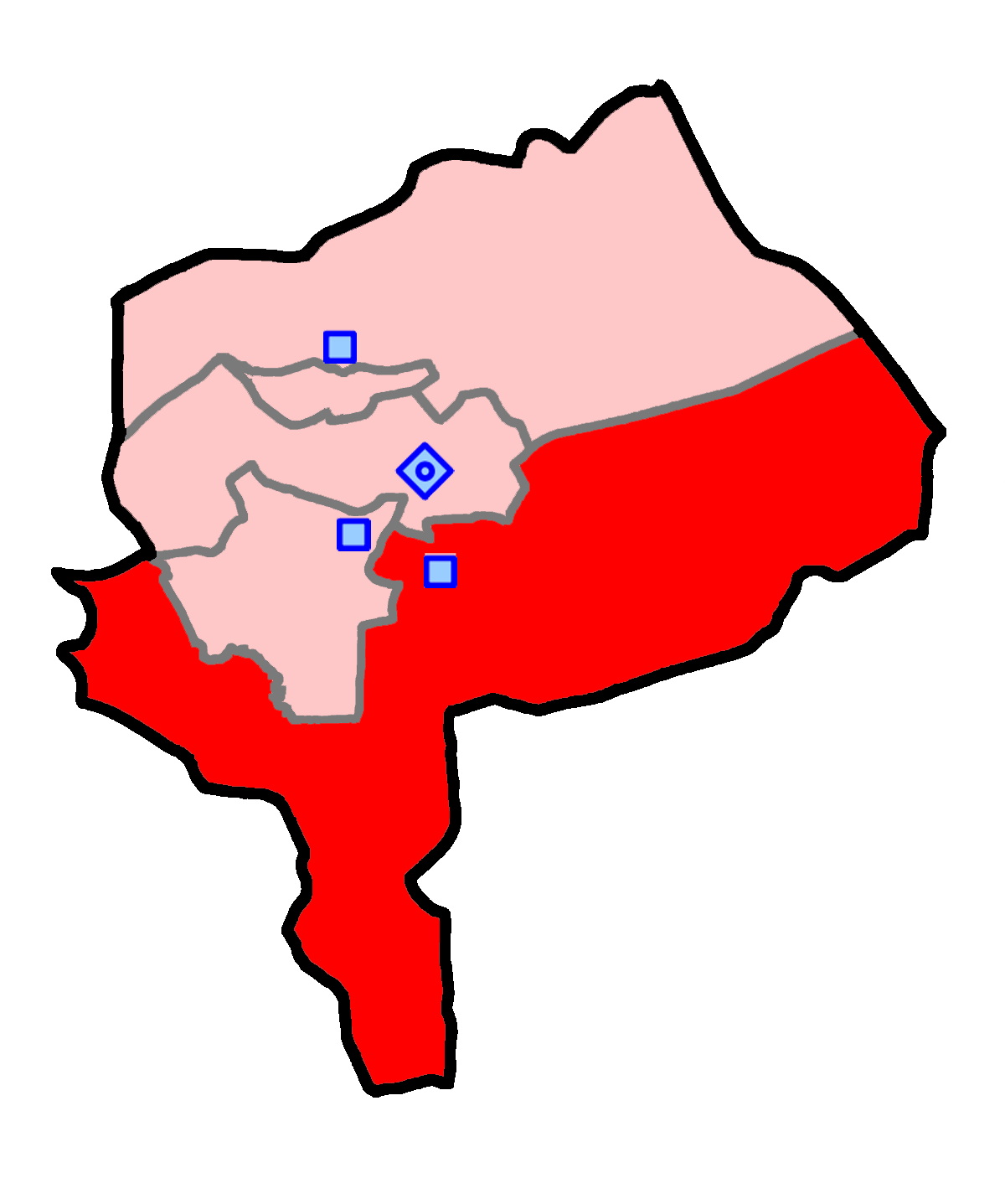 حوزهٔ انتخاباتی مهریز و بافق و ابرکوه و خاتم برای انتخابات مجلس شورای اسلامی